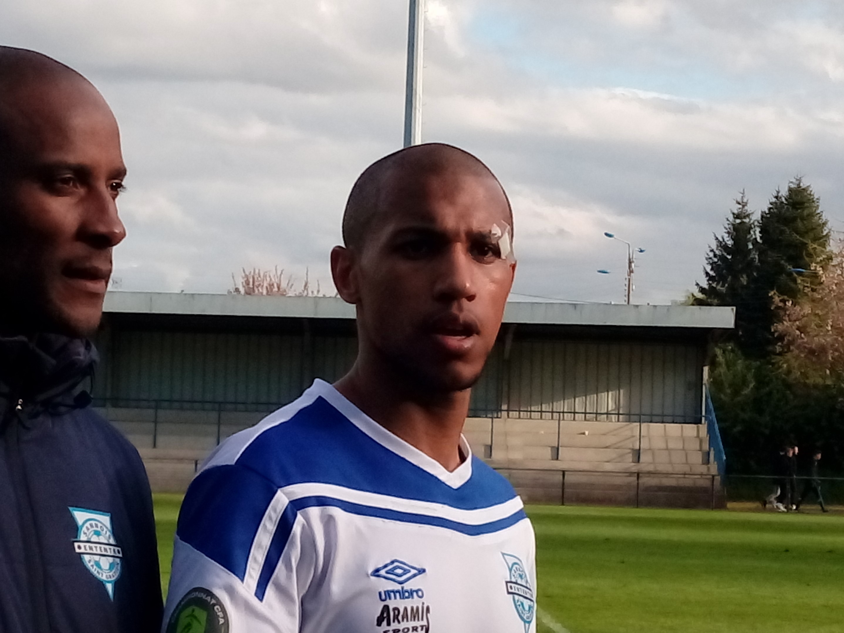 Jérémy Labor lors du match Lens B / Entente SSG, comptant pour la vingt-septième journée du Championnat de CFA 2016-2017, le 22 avril 2017.